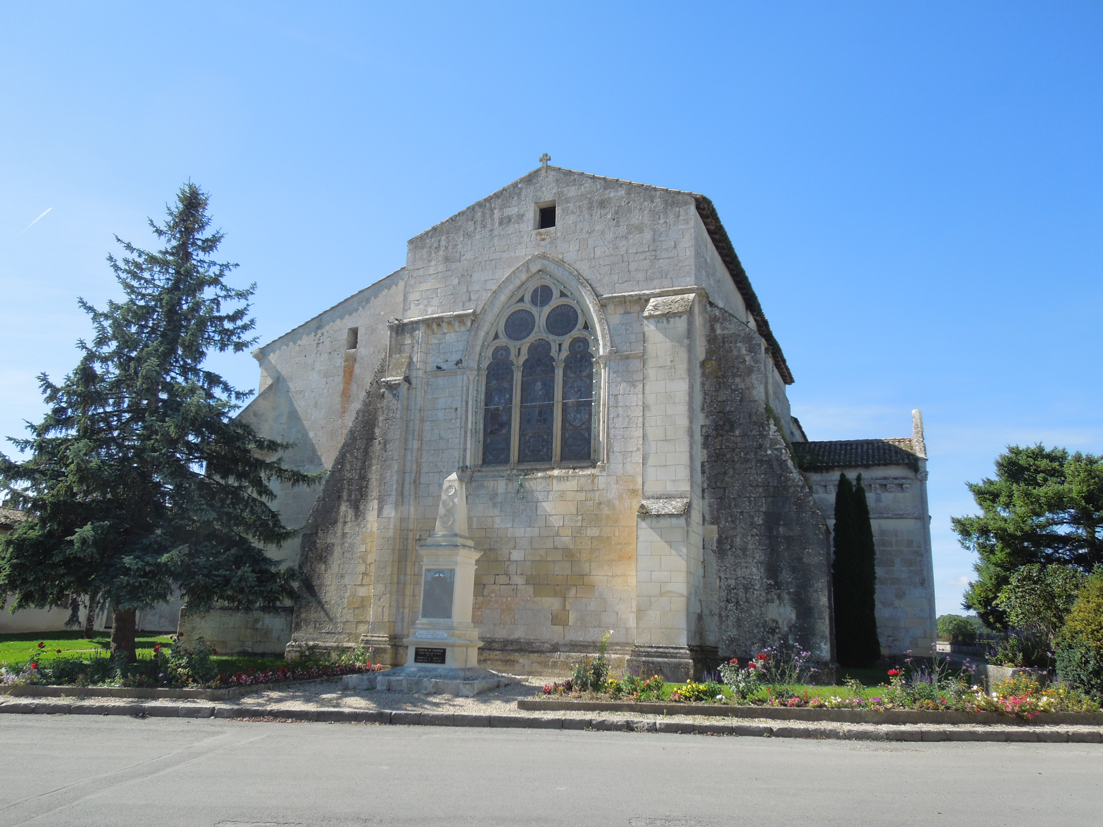 Die katholische Pfarrkirche Saint-Martin in Chadenac